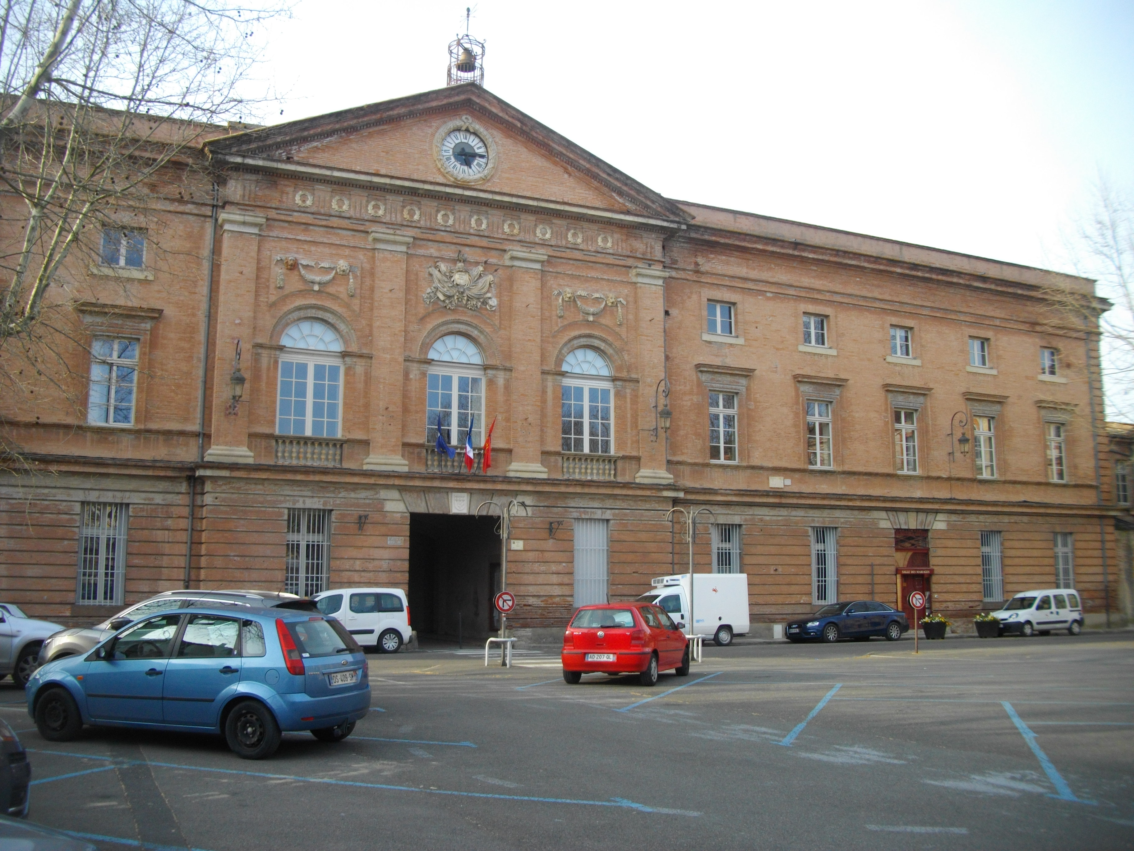 Façade de la mairie de Gaillac en brique style néo-classique. Place d'Hautpoul.